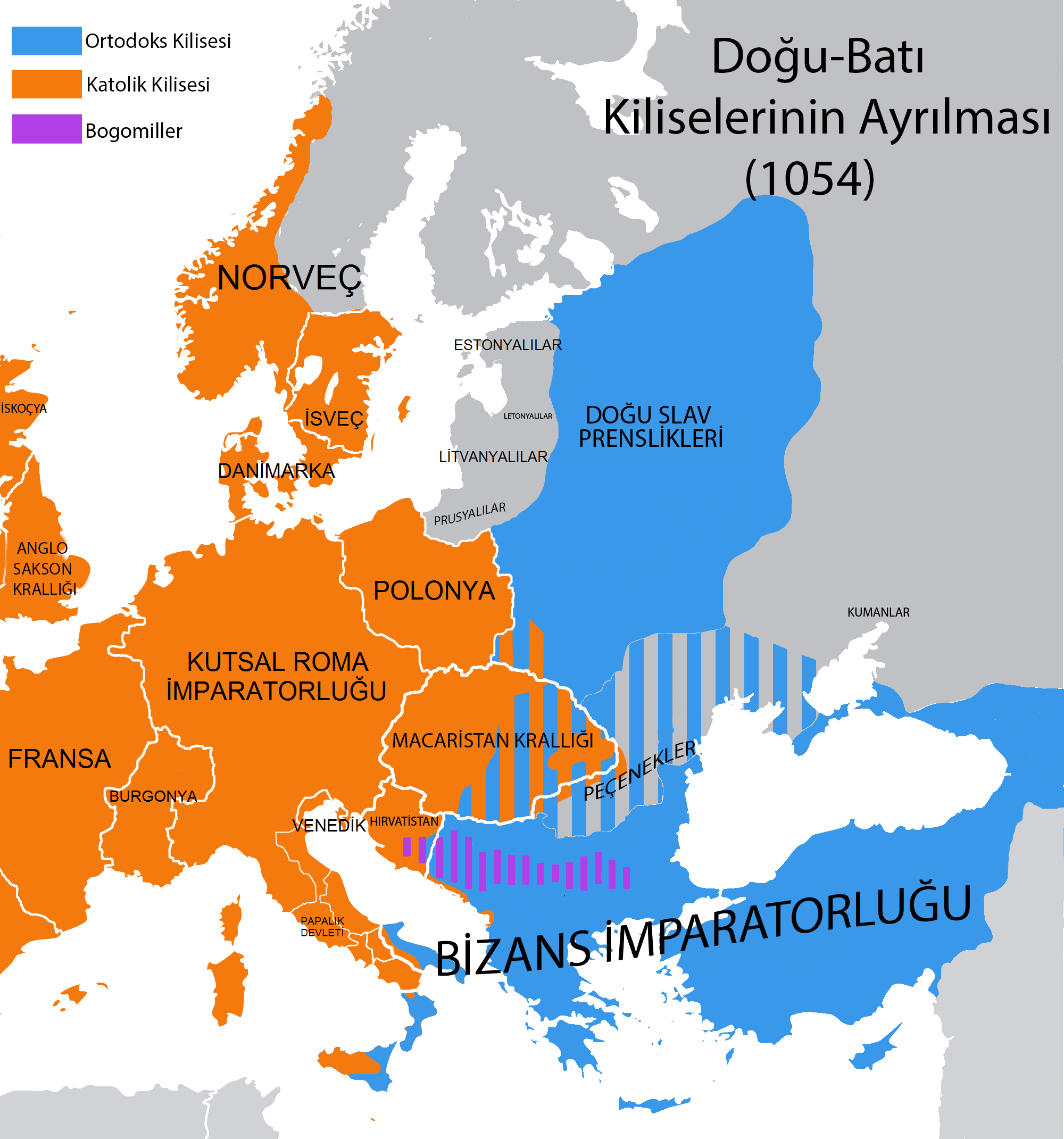 Eski ülke sınırlarıyla Doğu-Batı Kiliseleri ayrıldığı tarihteki dini dağılım.